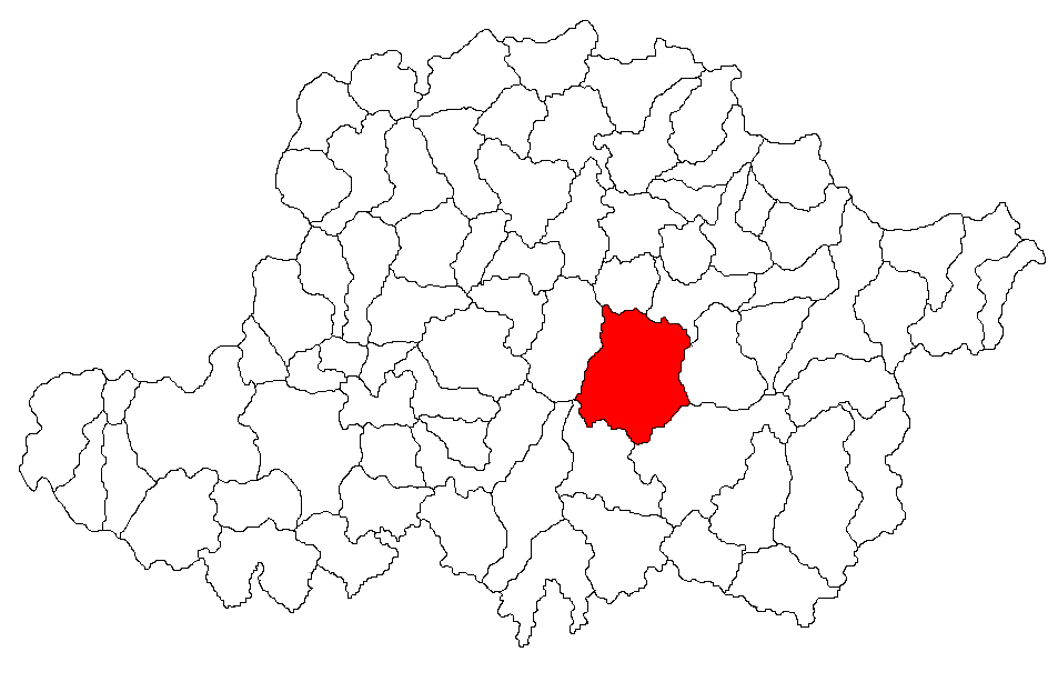 Categorie:Hărţi ale judeţului Arad